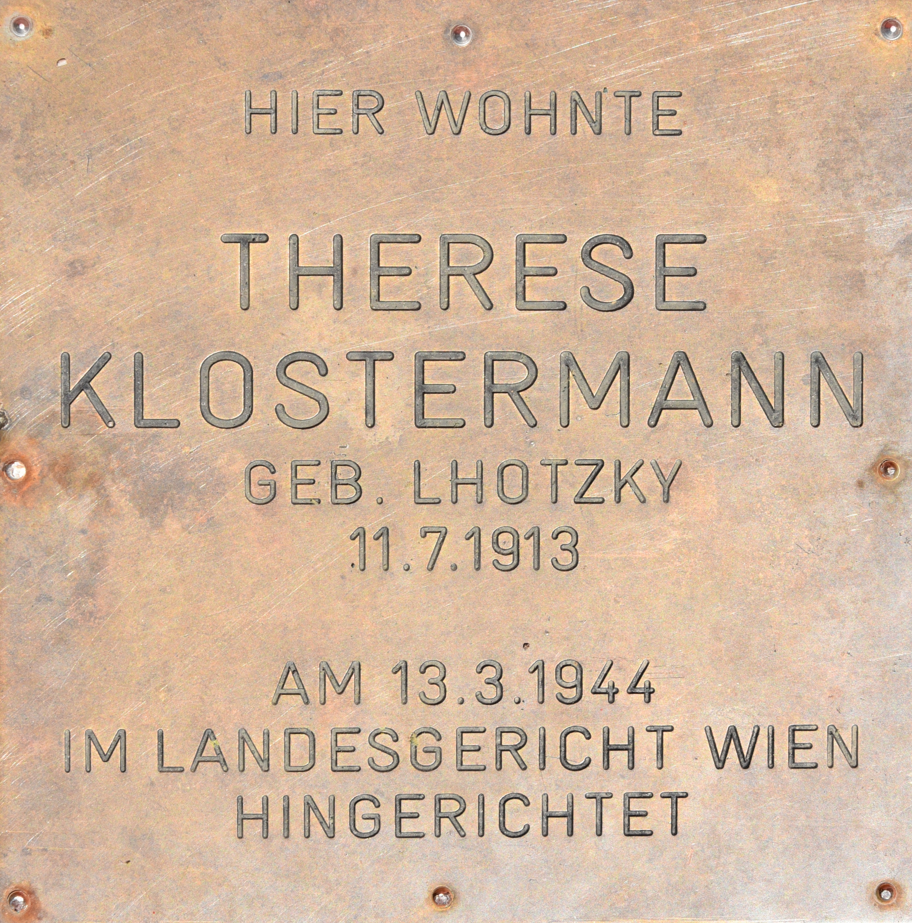 Steine der Erinnerung Wien-Liesing, Therese Klostermann, Carlbergergasse 39, 1230 Wien